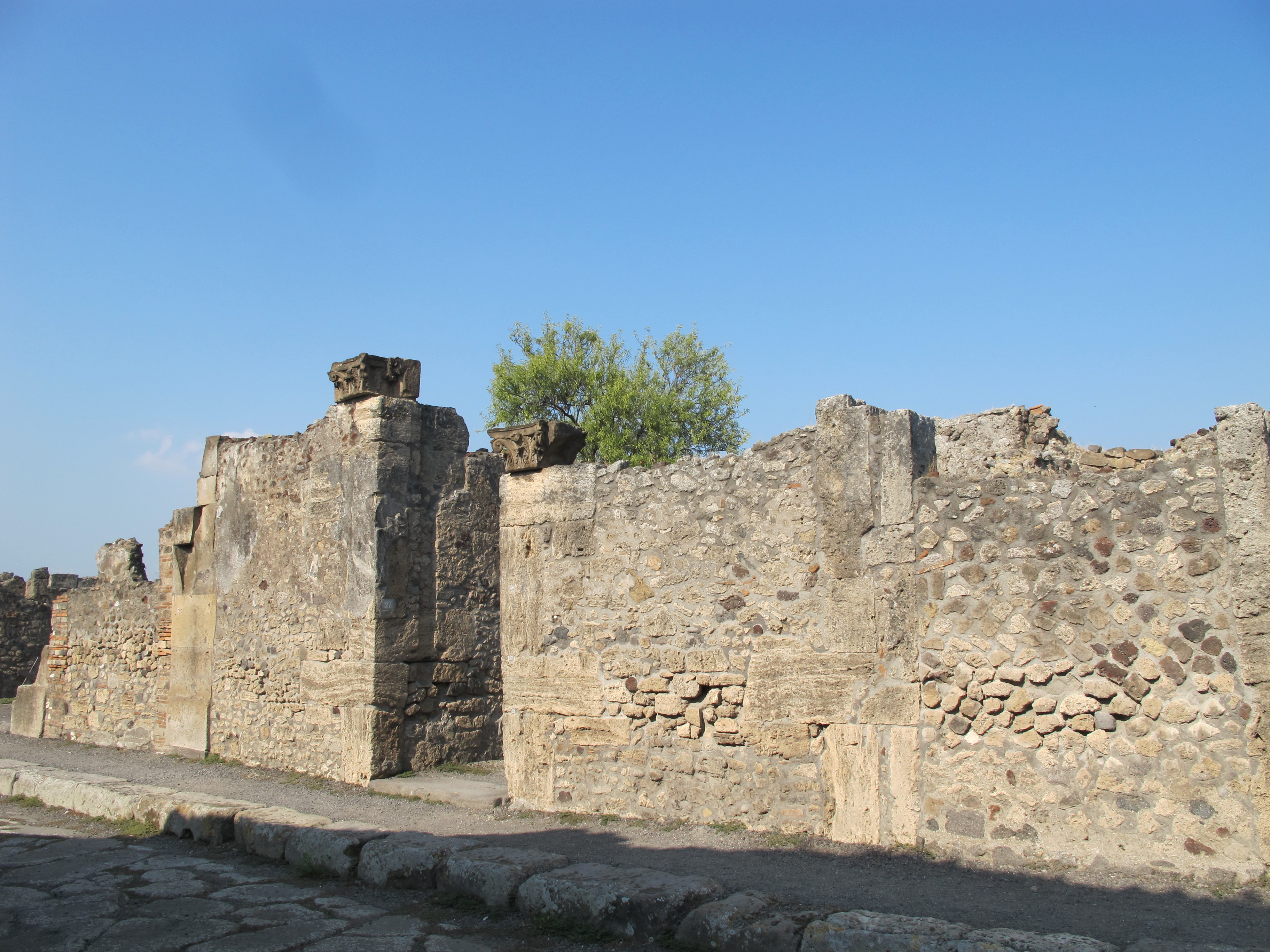 Pompei 2012